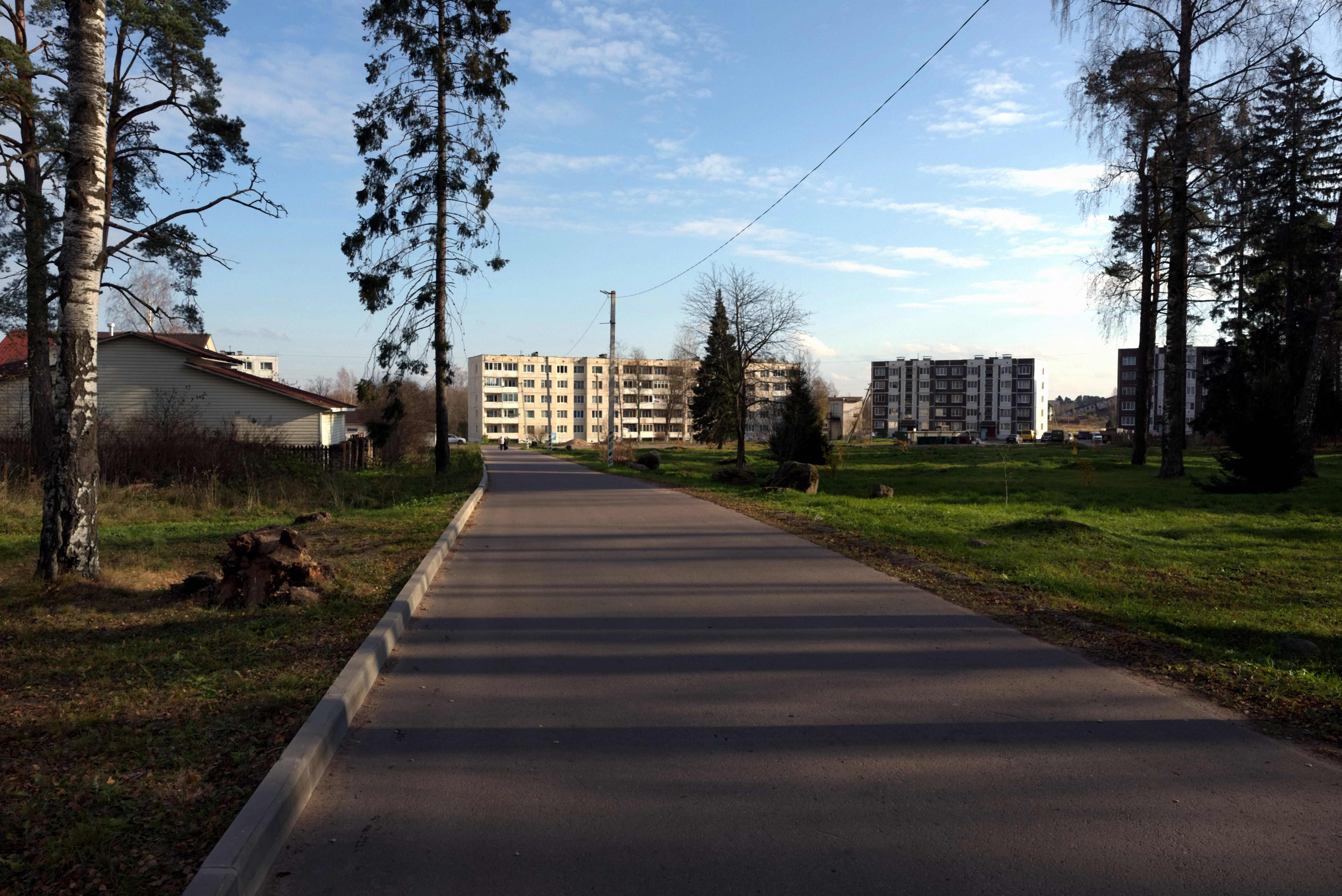 Räisälä 24.10.2016